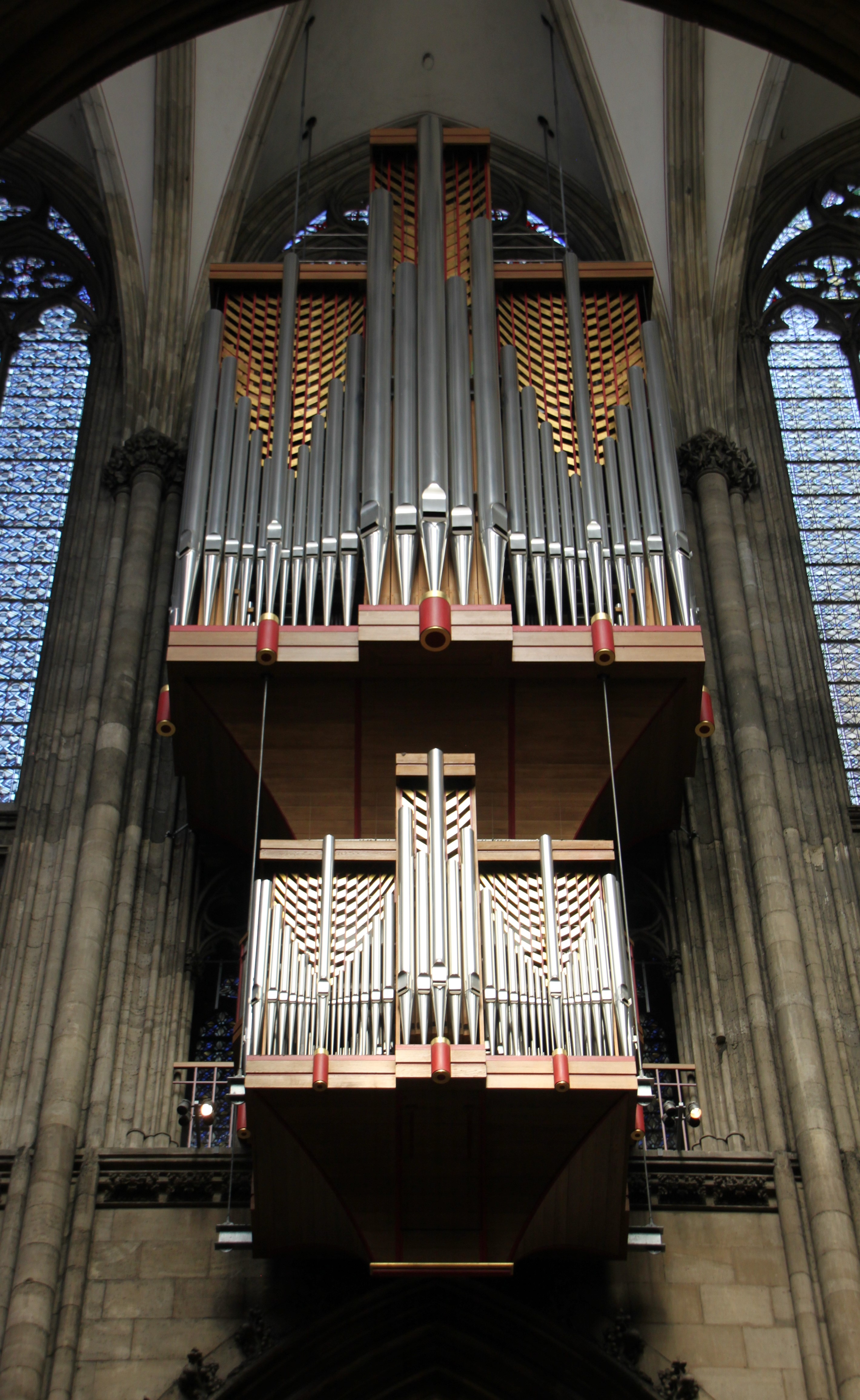 Die Schwalbennestorgel des Kölner Doms von unten gesehen.